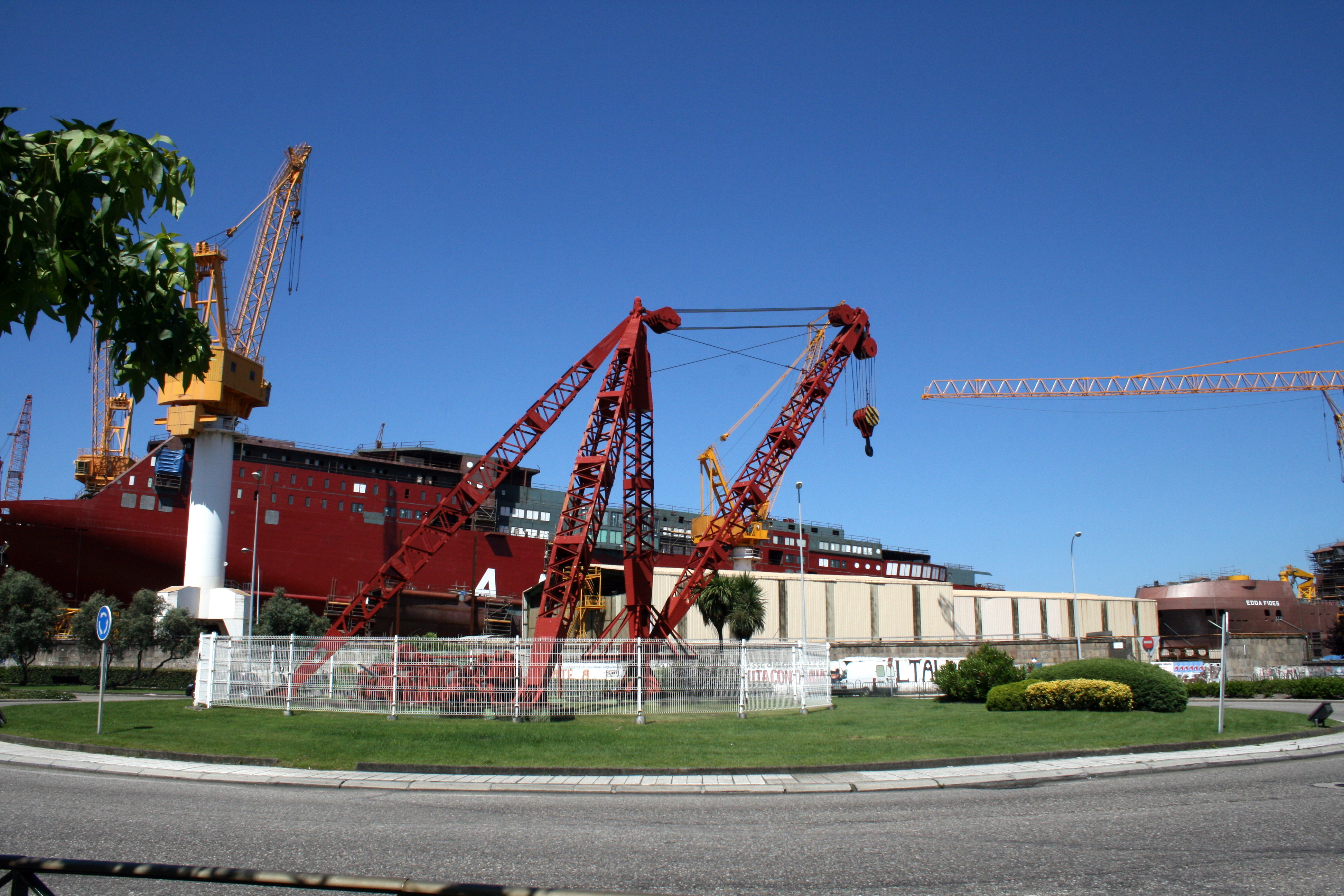 Rotonda con grua Vigo